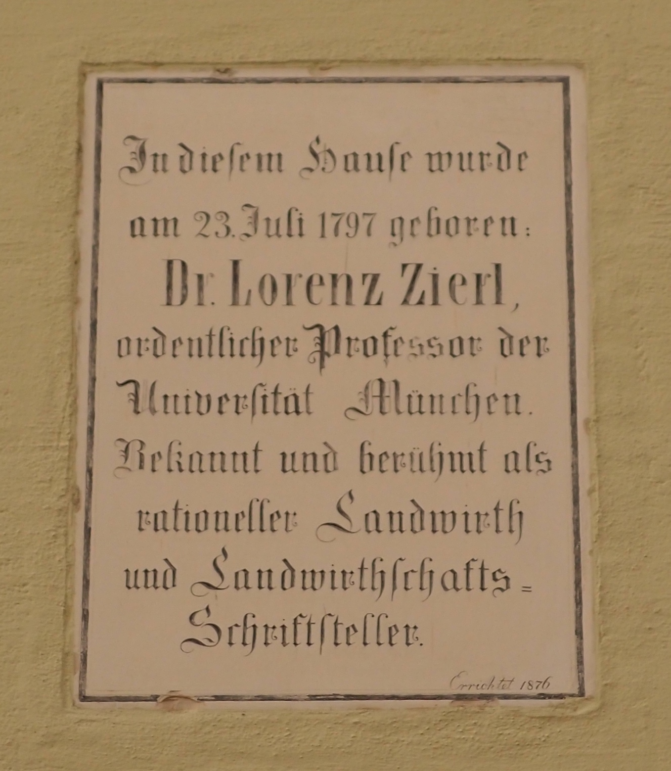 Tafel zur Erinnerung an den Agrarwissenschafter Lorenz Zierl (1797-1844) an dessen Geburtshaus in Furth im Wald